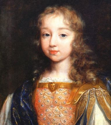 Louis XIV âgé de 5 ans